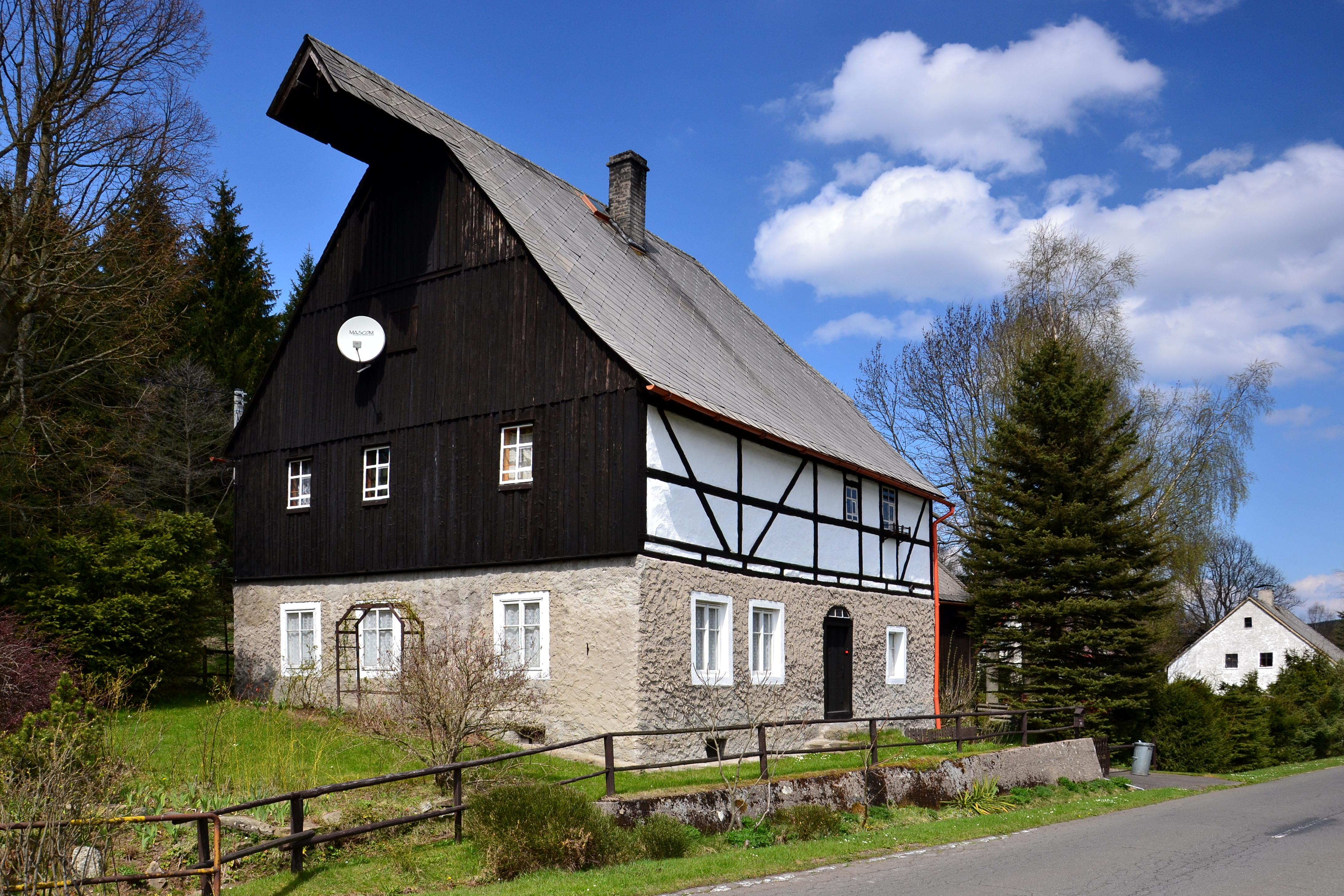 Hrázděný dům